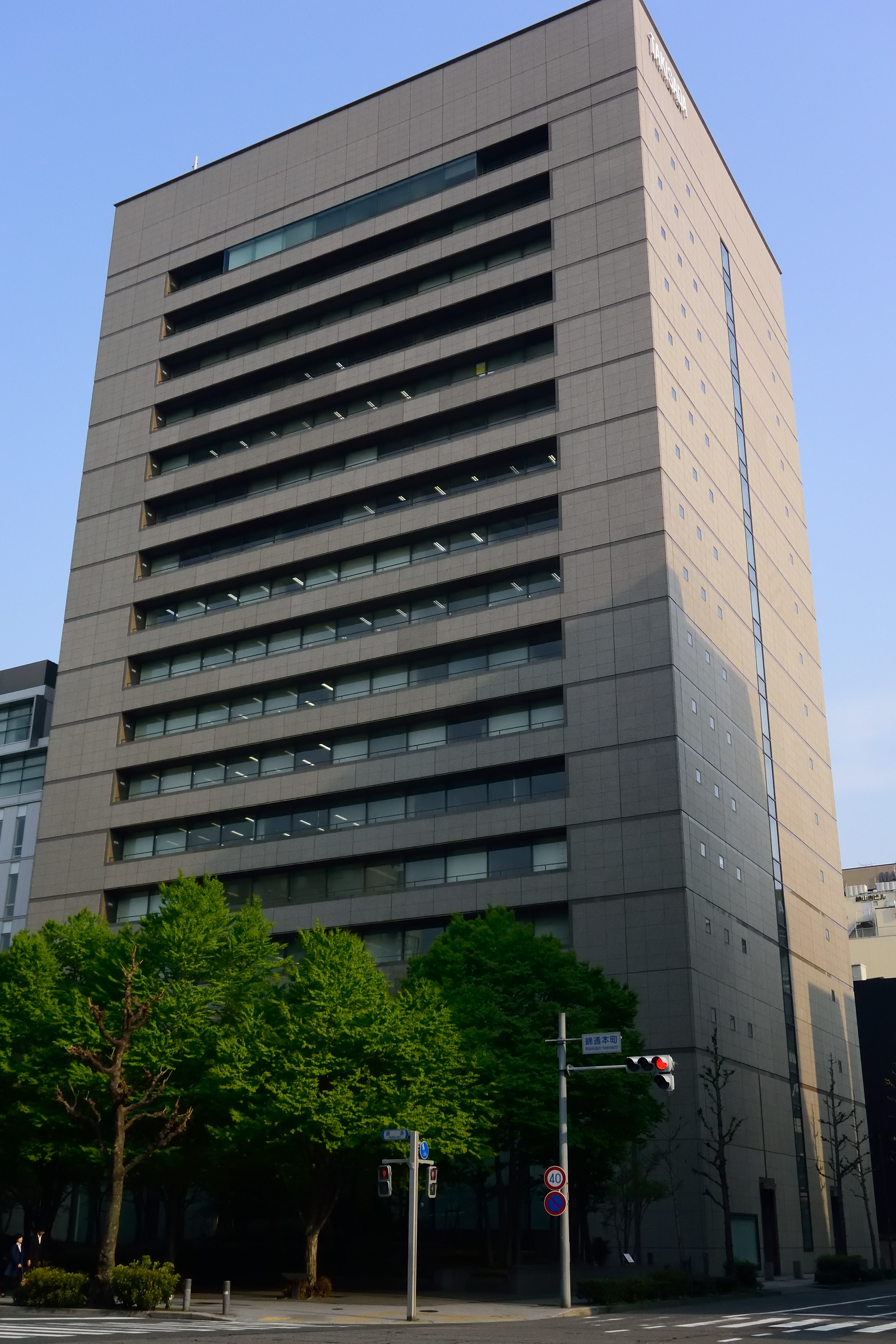 瀧定名古屋ビル